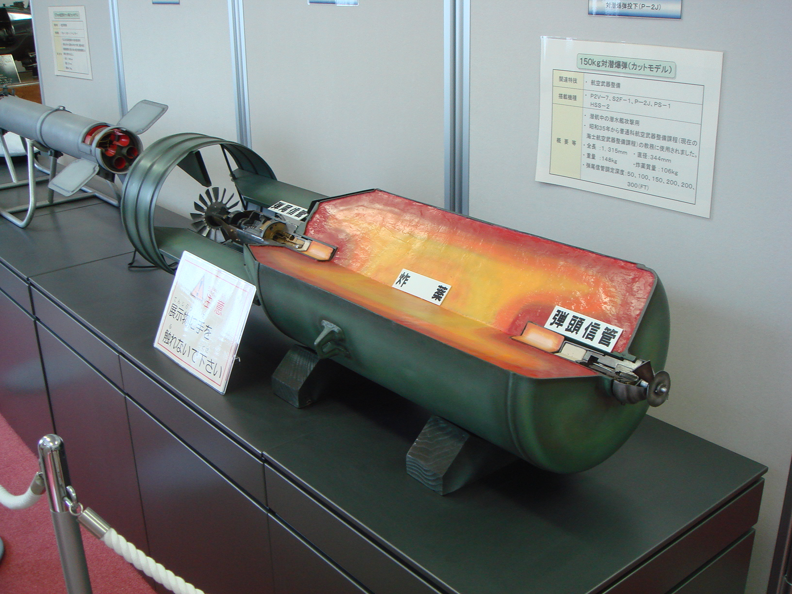 下総航空基地内史料展示室にて撮影